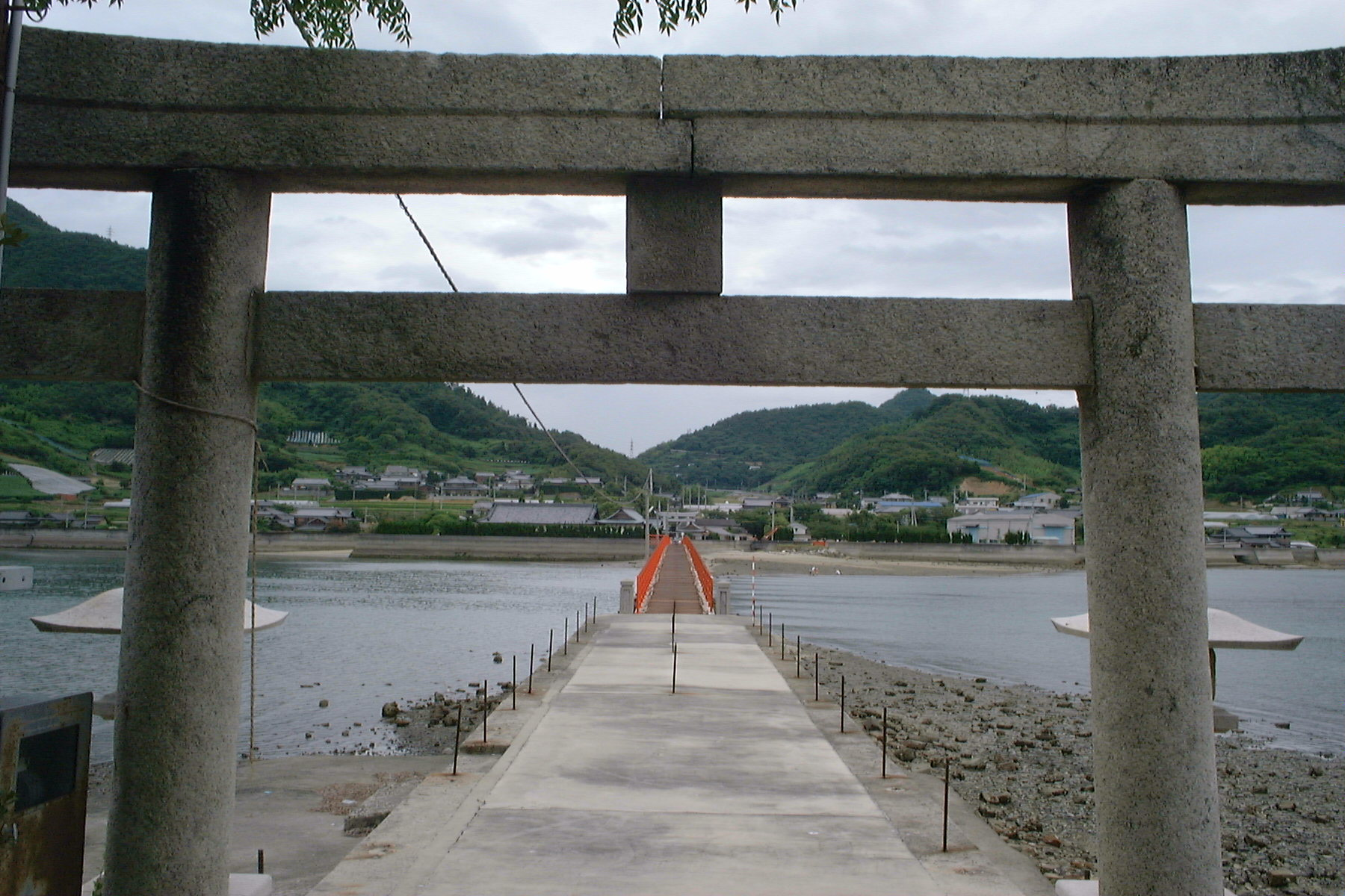 津島神社から本土側を見る